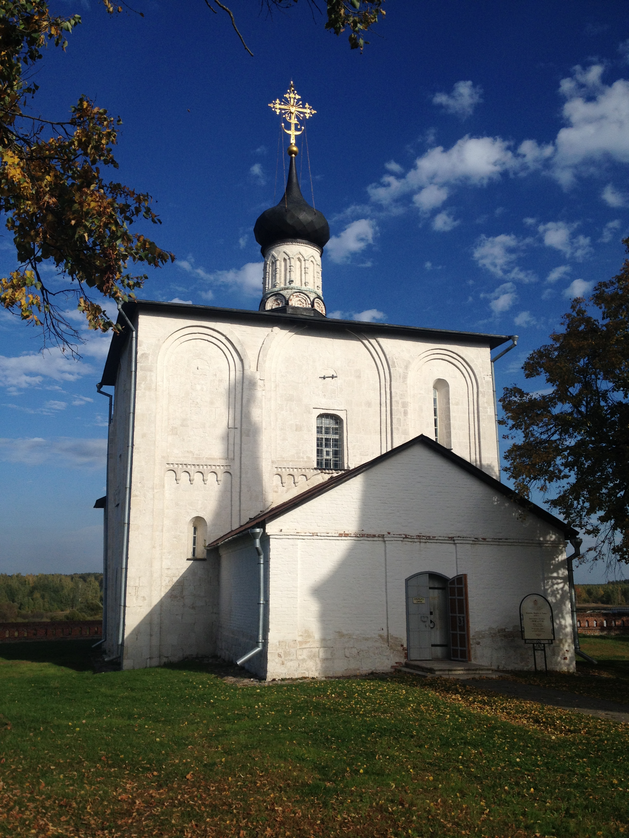 Церковь Бориса и Глеба: Кидекша, Суздальский район, Владимирская область